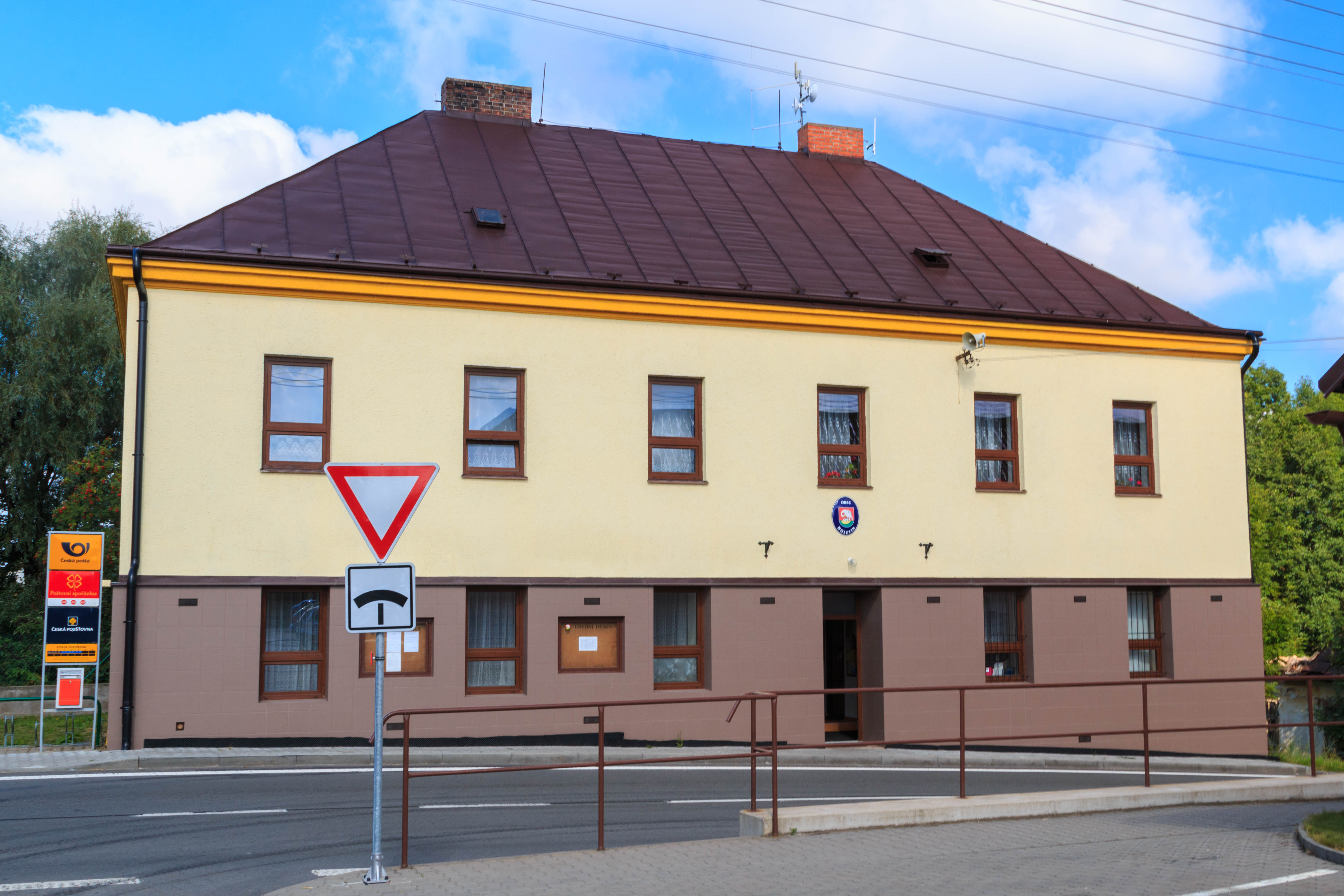 Holetín - obecní úřad